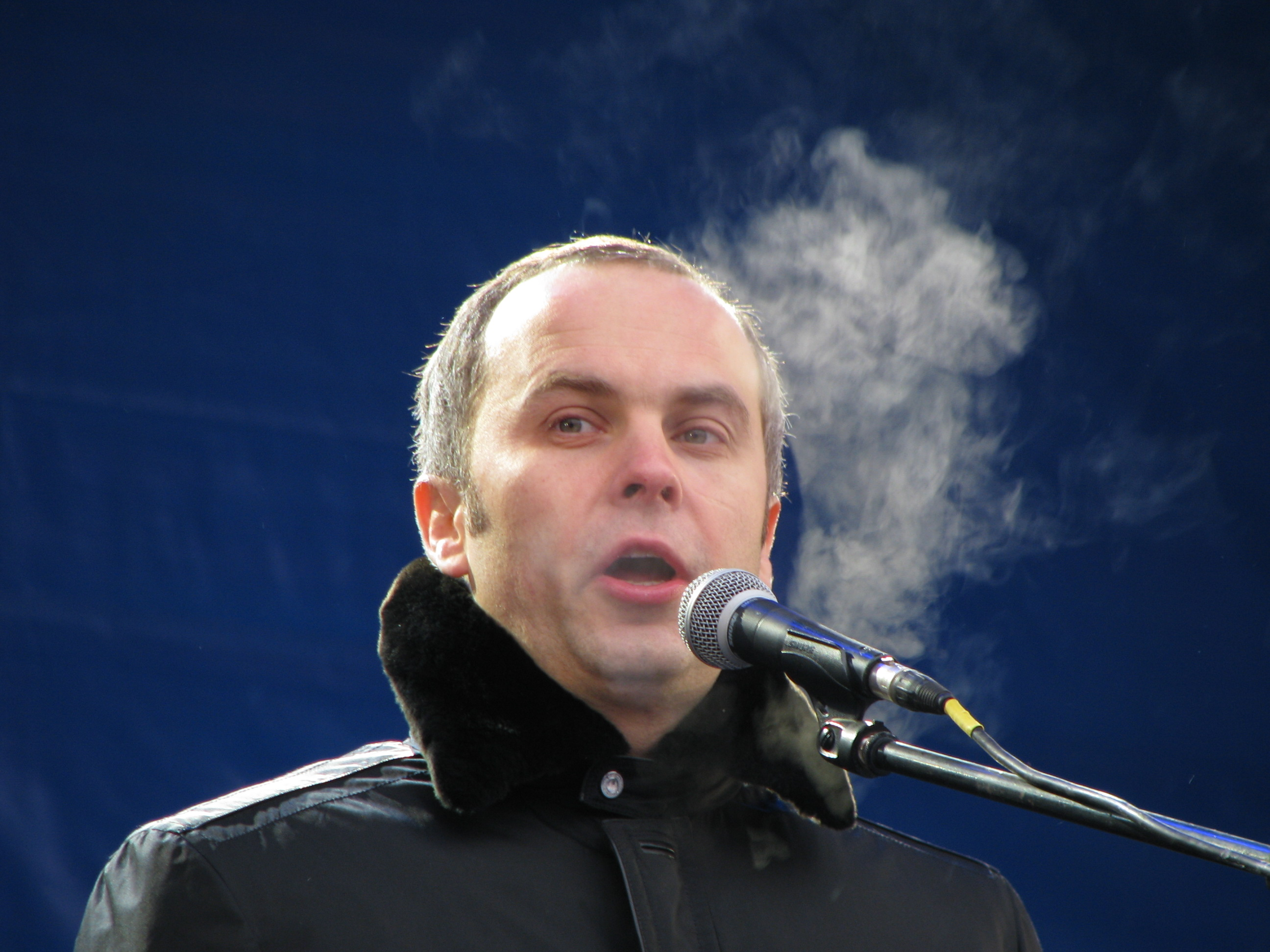 Выступление Н. И. Шуфрича на митинге у стен ЦИК Украины в поддержку правильного подсчета голосов на президентских выборах 2010 года на Украине 8 февраля 2010 года